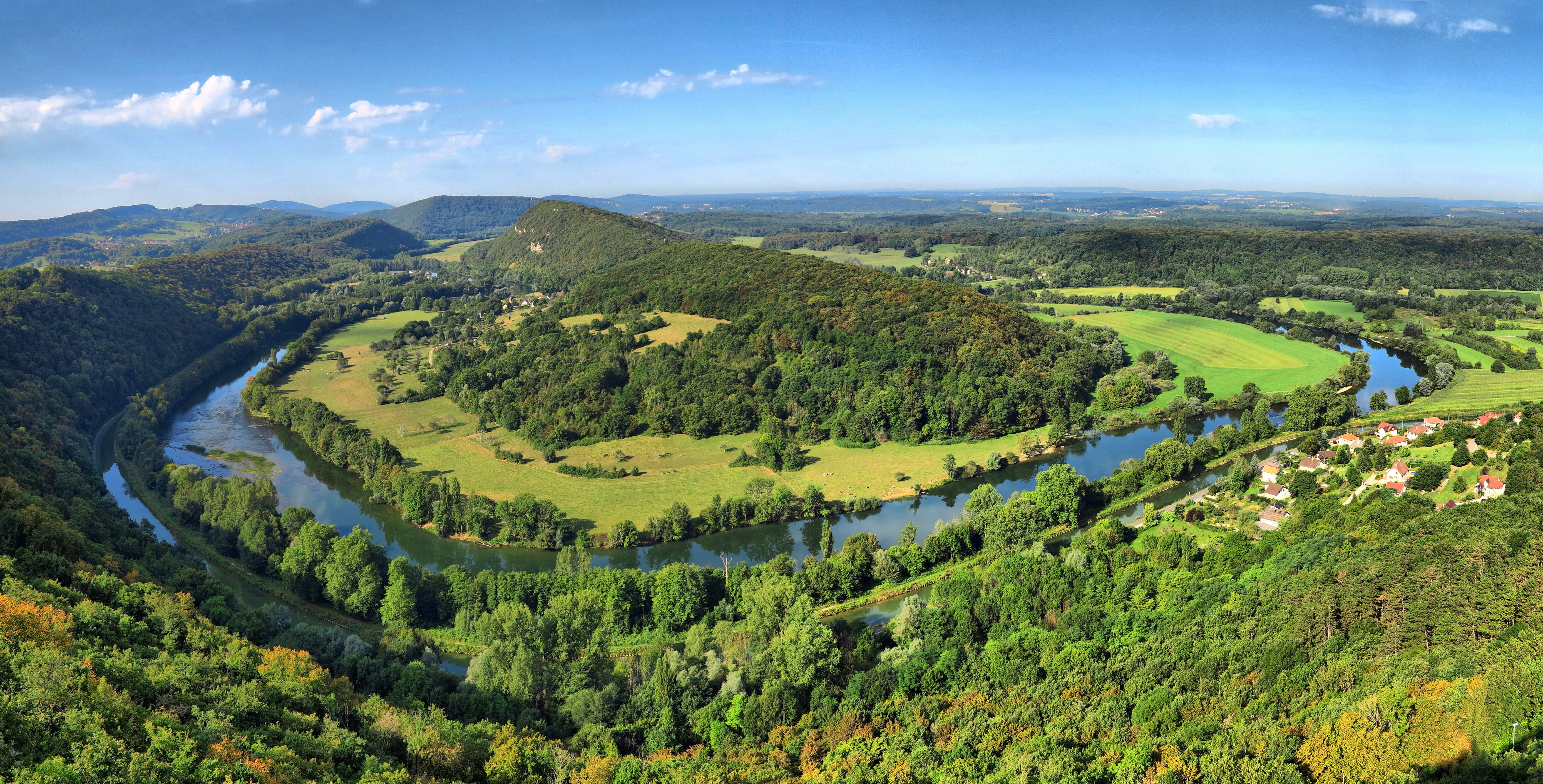 La boucle du Doubs à Rancenay vue depuis le belvédère du rocher de Valmy